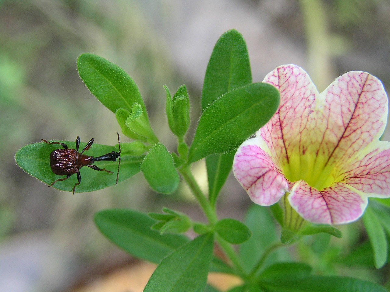 ペチュニアの葉に止まるヒゲナガオトシブミ Paratrachelophorus longicornis